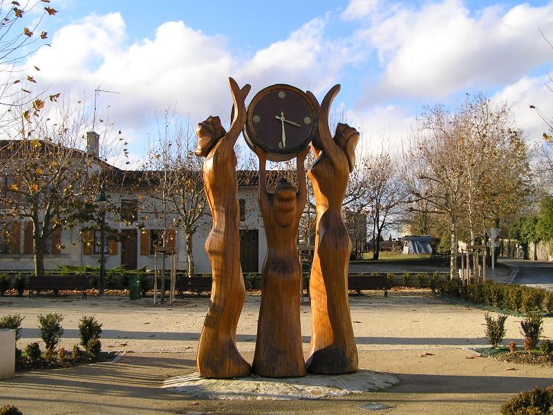 sculture sur la place de Bréville